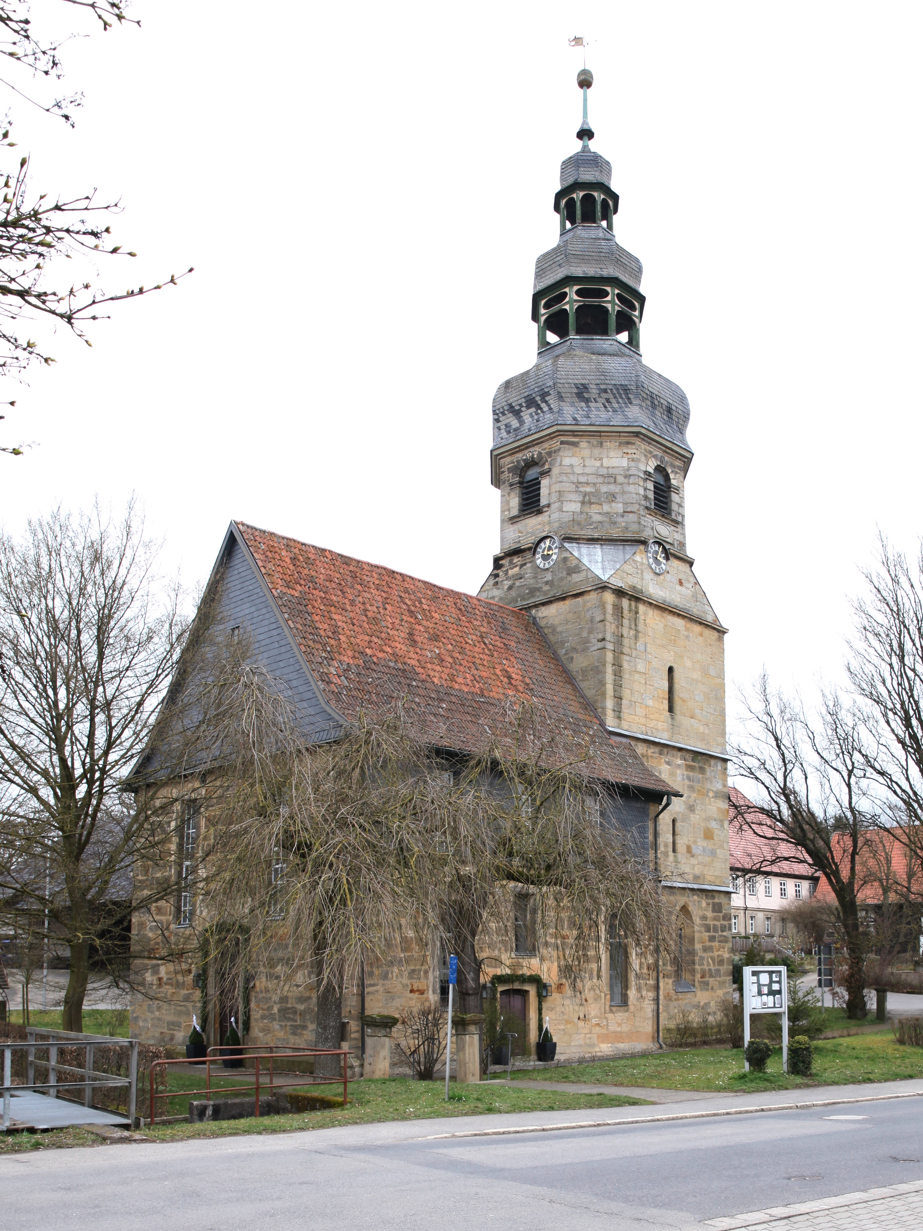 Evangelische Pfarrkirche in Großheirath